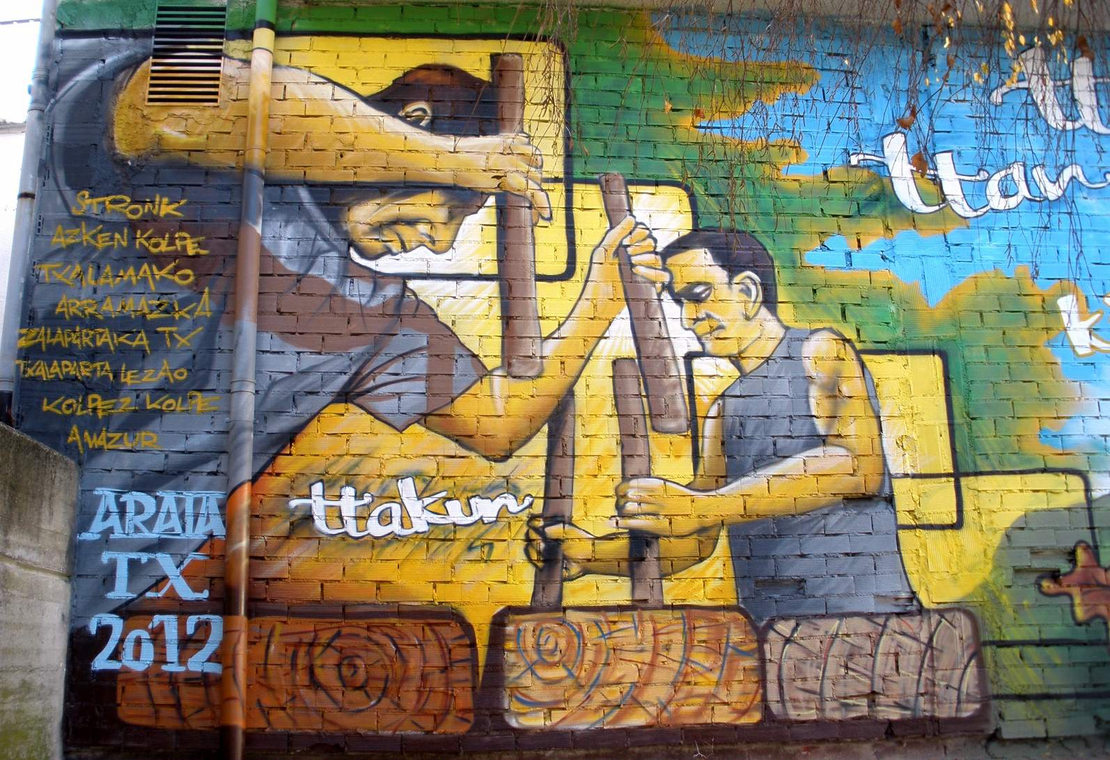 Araia, Álava.